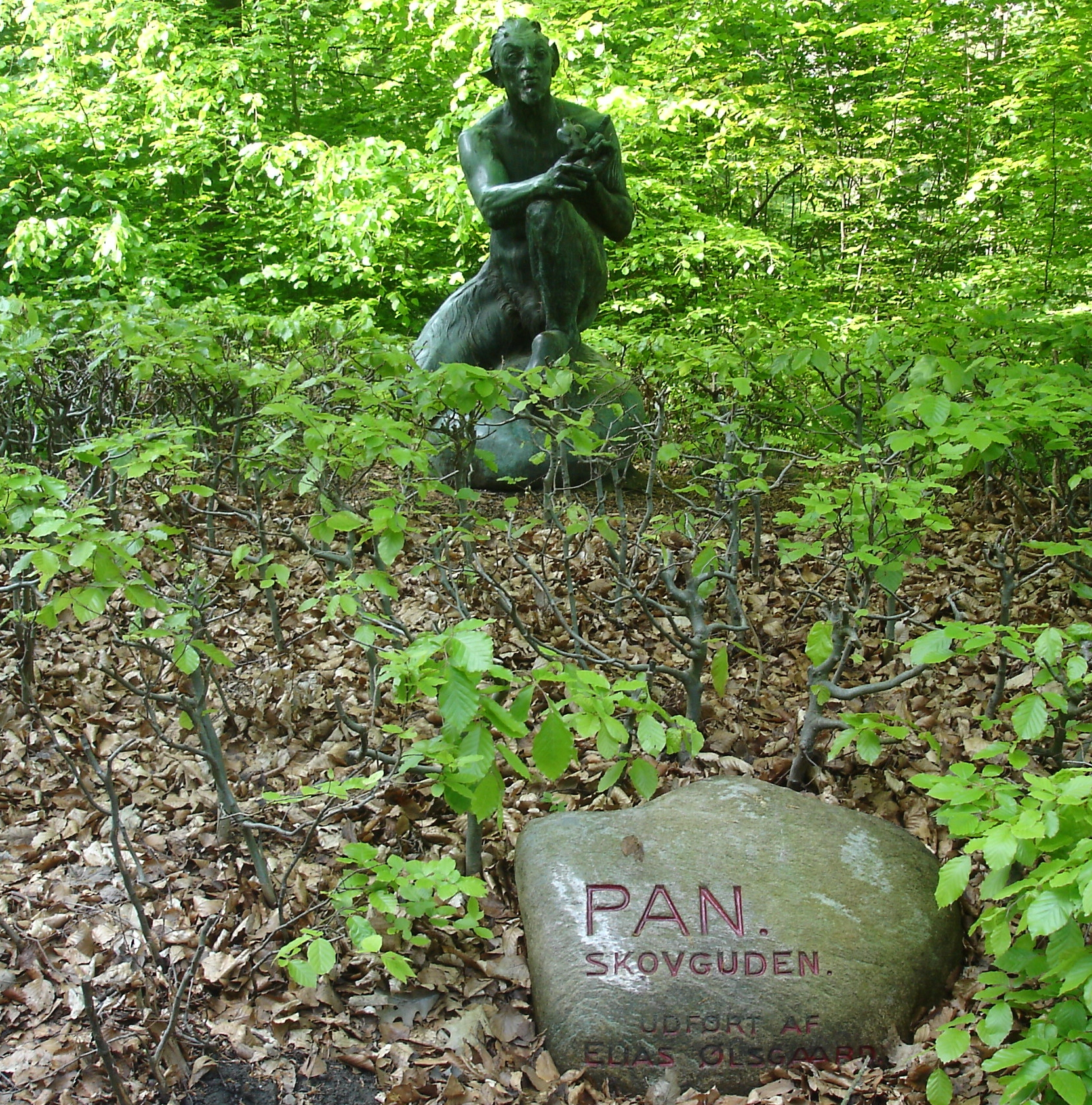 Skovguden Pan i Marselisborg Skov, skulptur udført af Elias Ølsgaard i bronze 1938